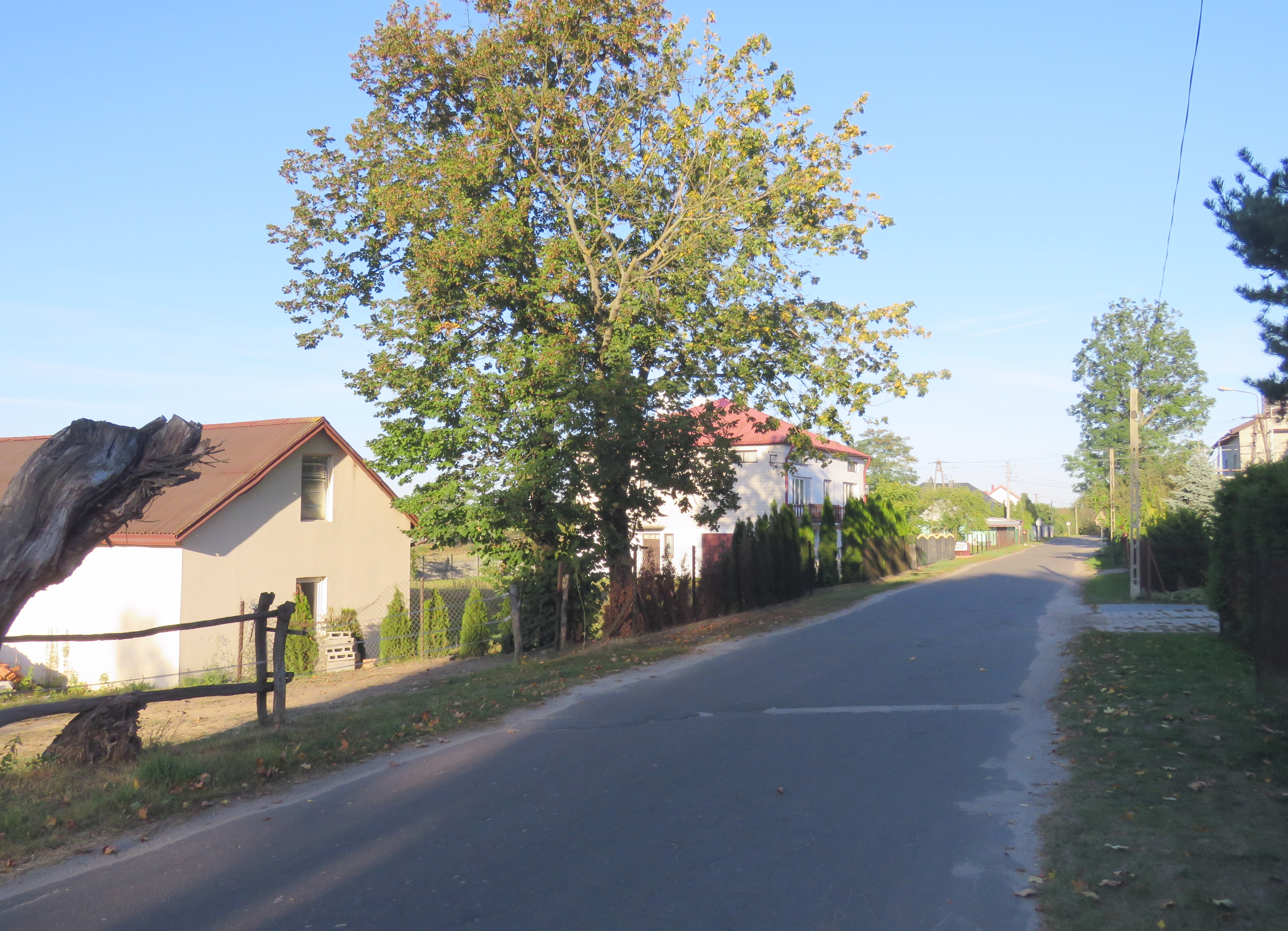 Łubiec, gm. Leszno